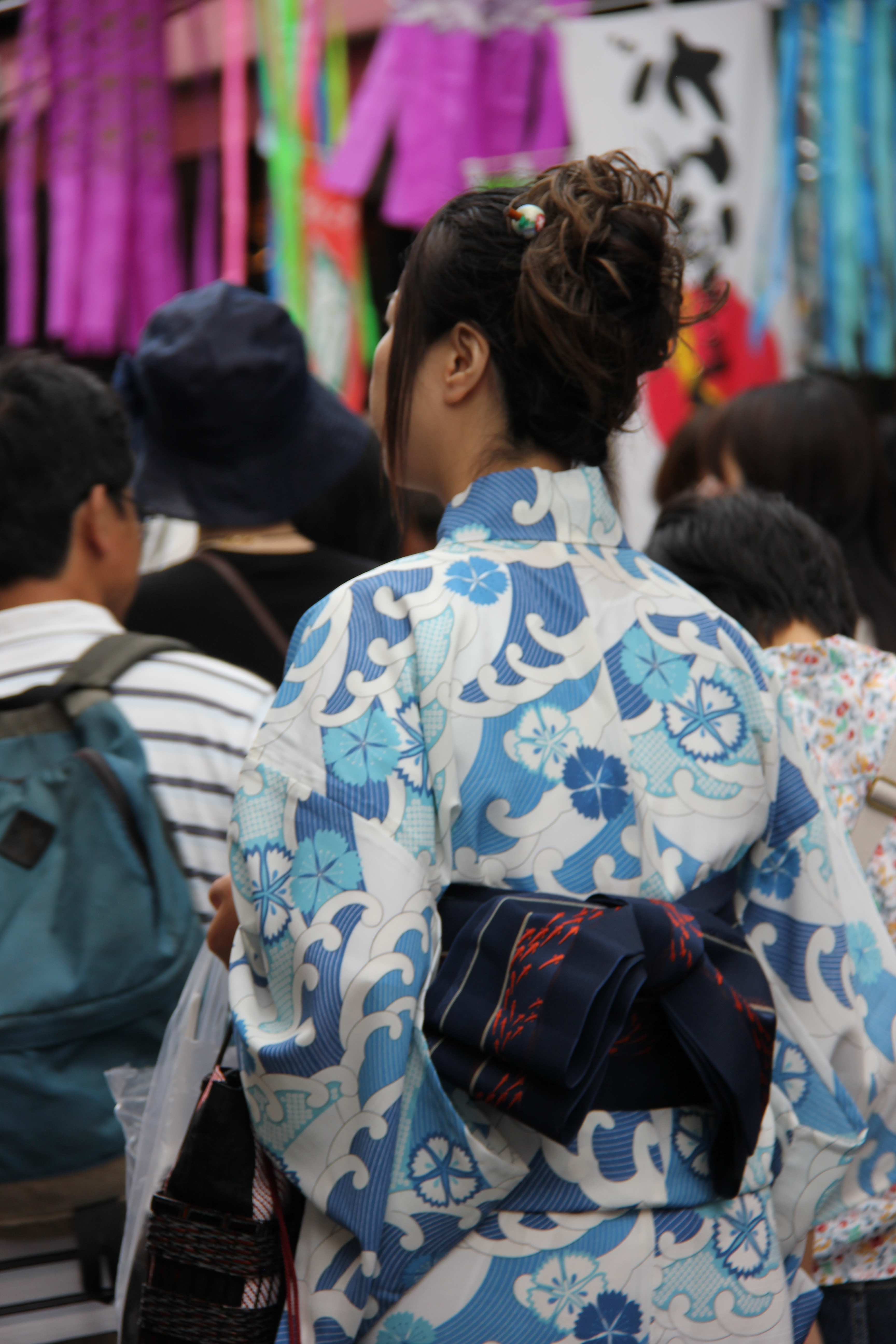 Shitamachi Tanabata Matsuri